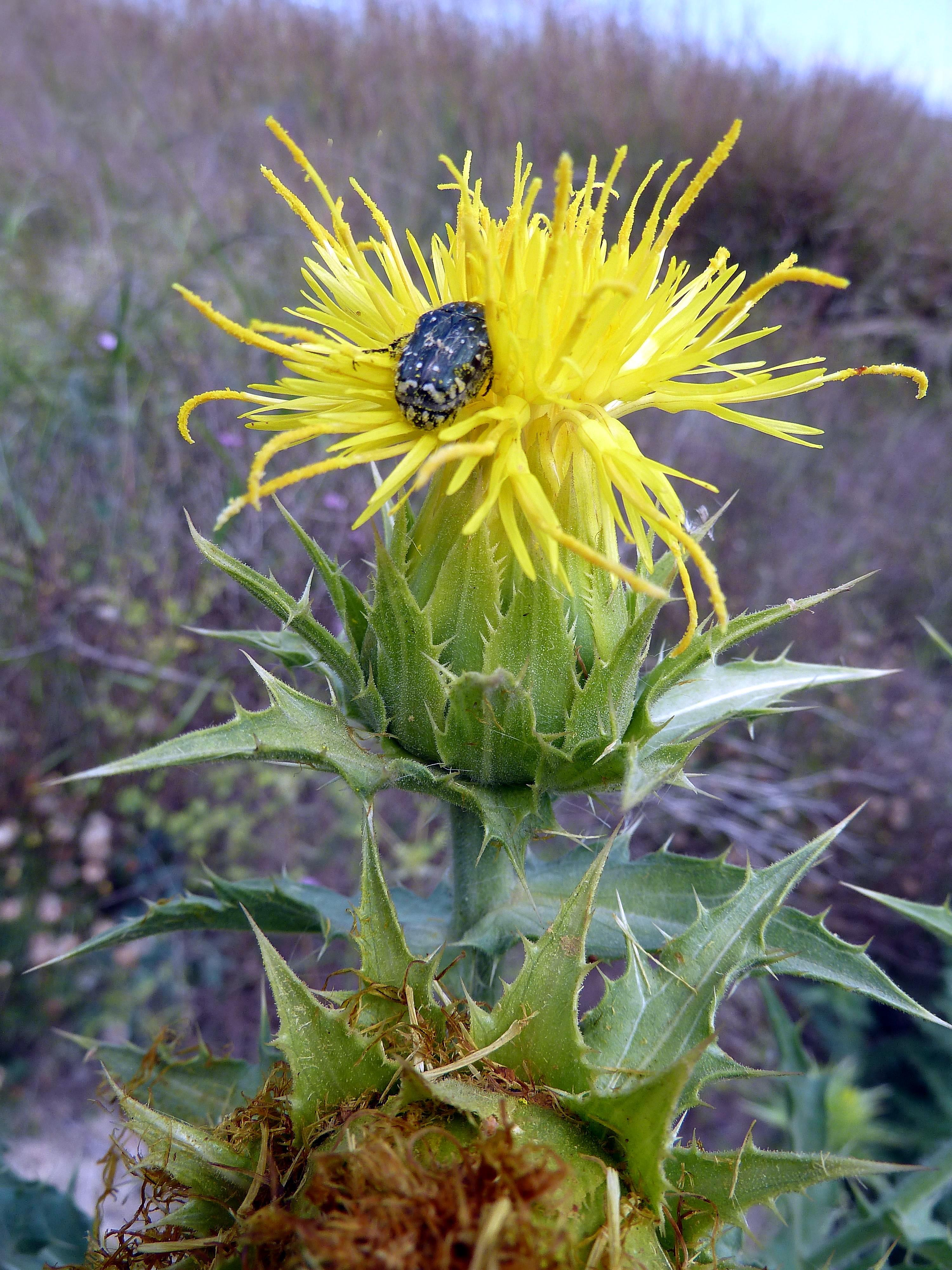 Carthamus arborescens : capítulo en antesis con Oxythyrea funesta - Camino de la Azarbe de Patricio, Albatera (Provincia de Alicante, España).